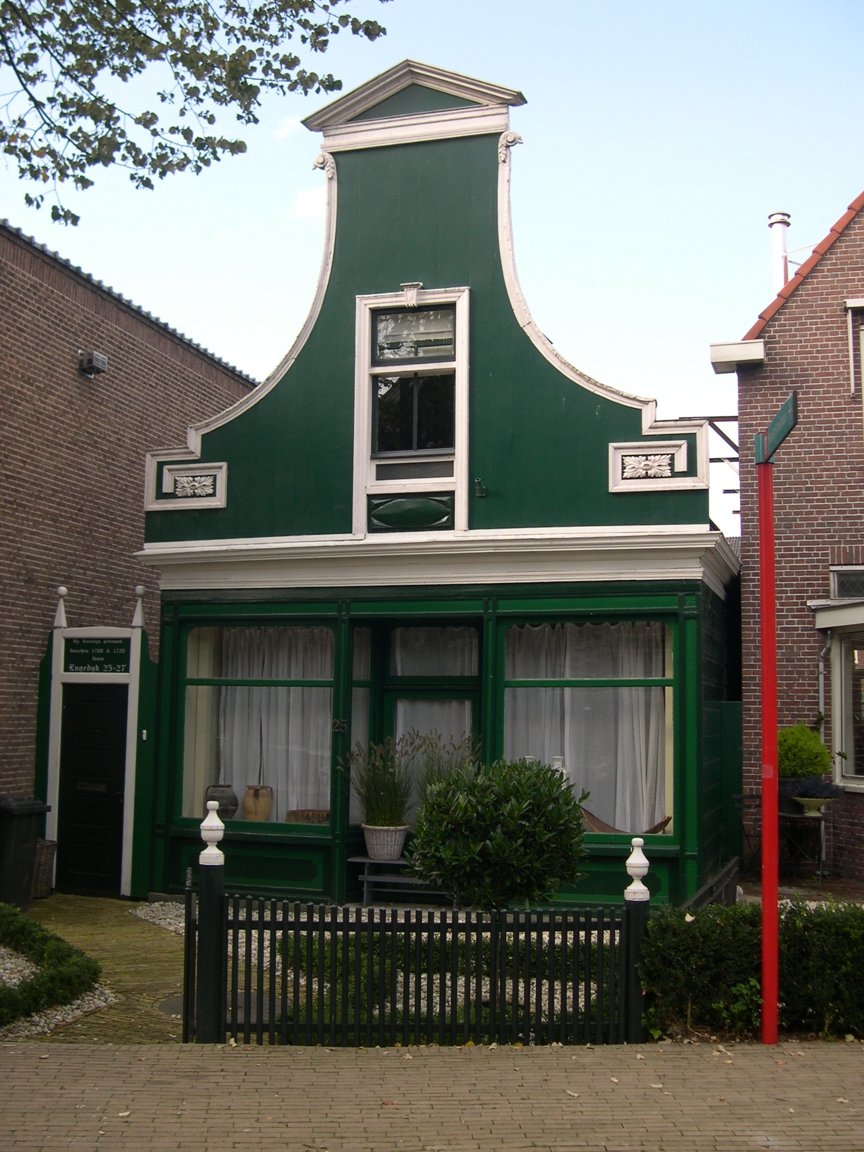 Een monumentaal gebouw uit de eerste helft van de 18e eeuw aan de Lagedijk in Zaandijk.